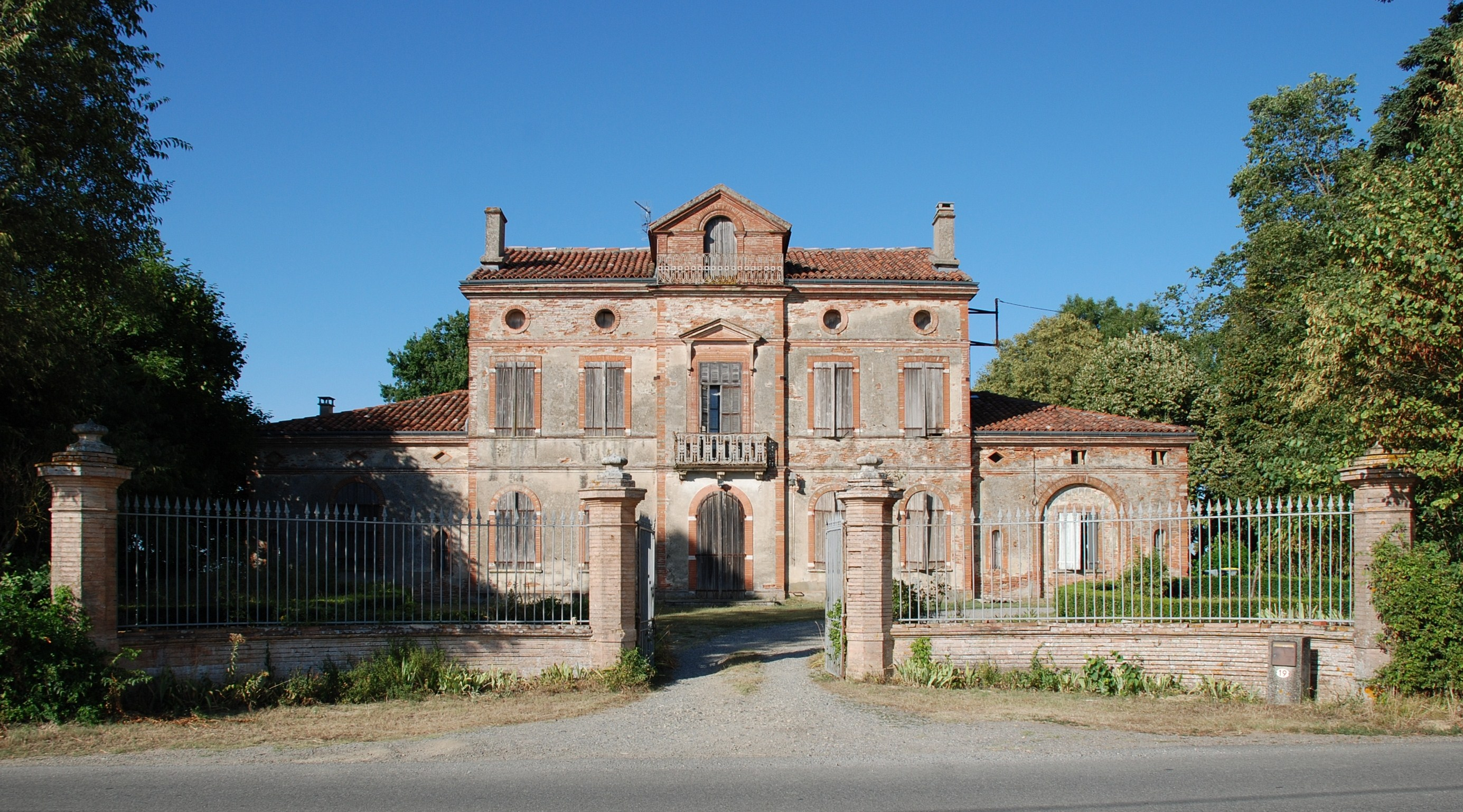 Mervilla (Haute-Garonne, Midi-Pyrénées, France) : Le Chateau de La Garrigue.